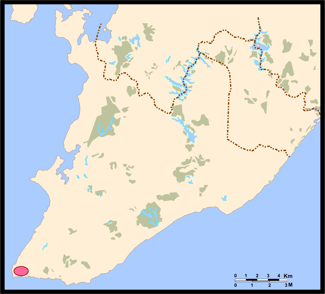 Bairro da Barra - Mapa de Salvador (Bahia, Brazil)